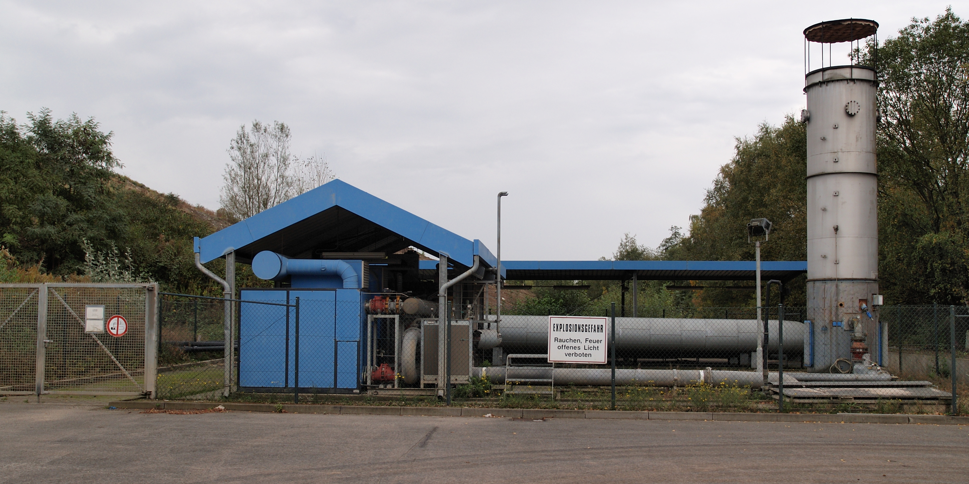 Mülldeponie Bochum Kornharpen, Verdichterstation für Deponiegas